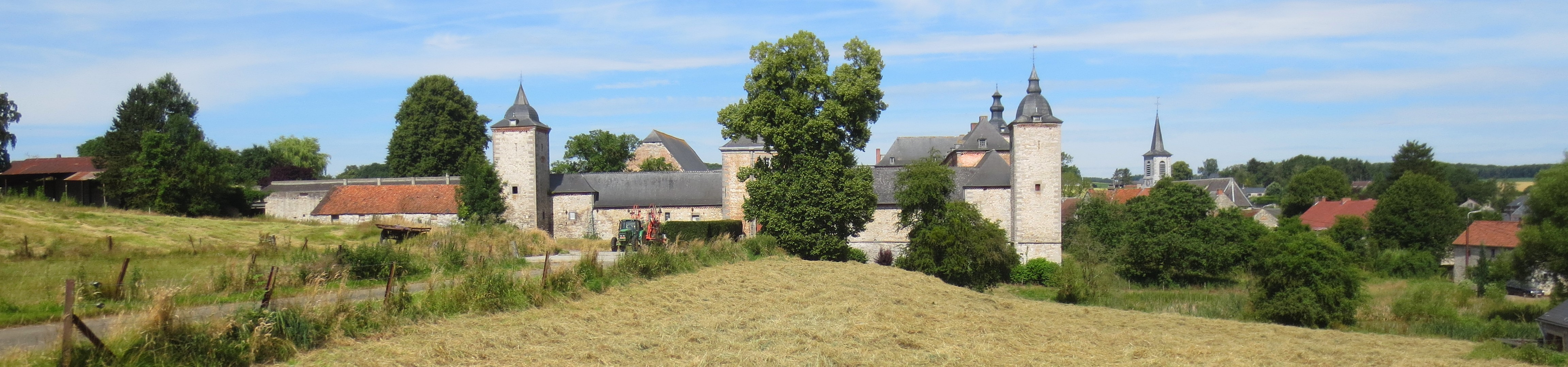 Vue panoramique de Falaen